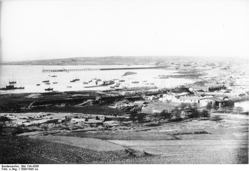 Schutzgebiet Kiautschou Iltis-Brücke in Tsingtau